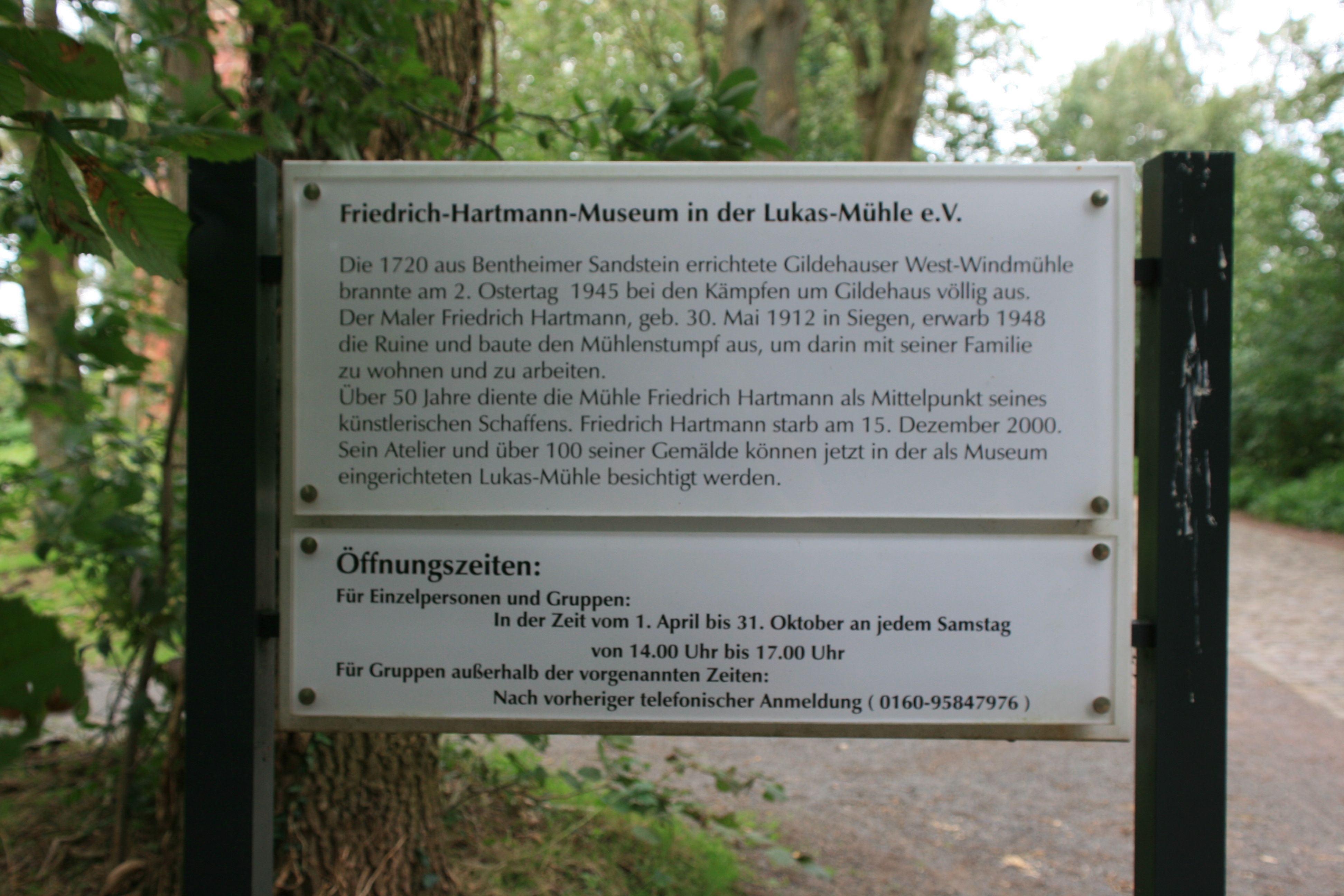 Lukas-Mühle, Mühlenberg in Gildehaus Bad Bentheim